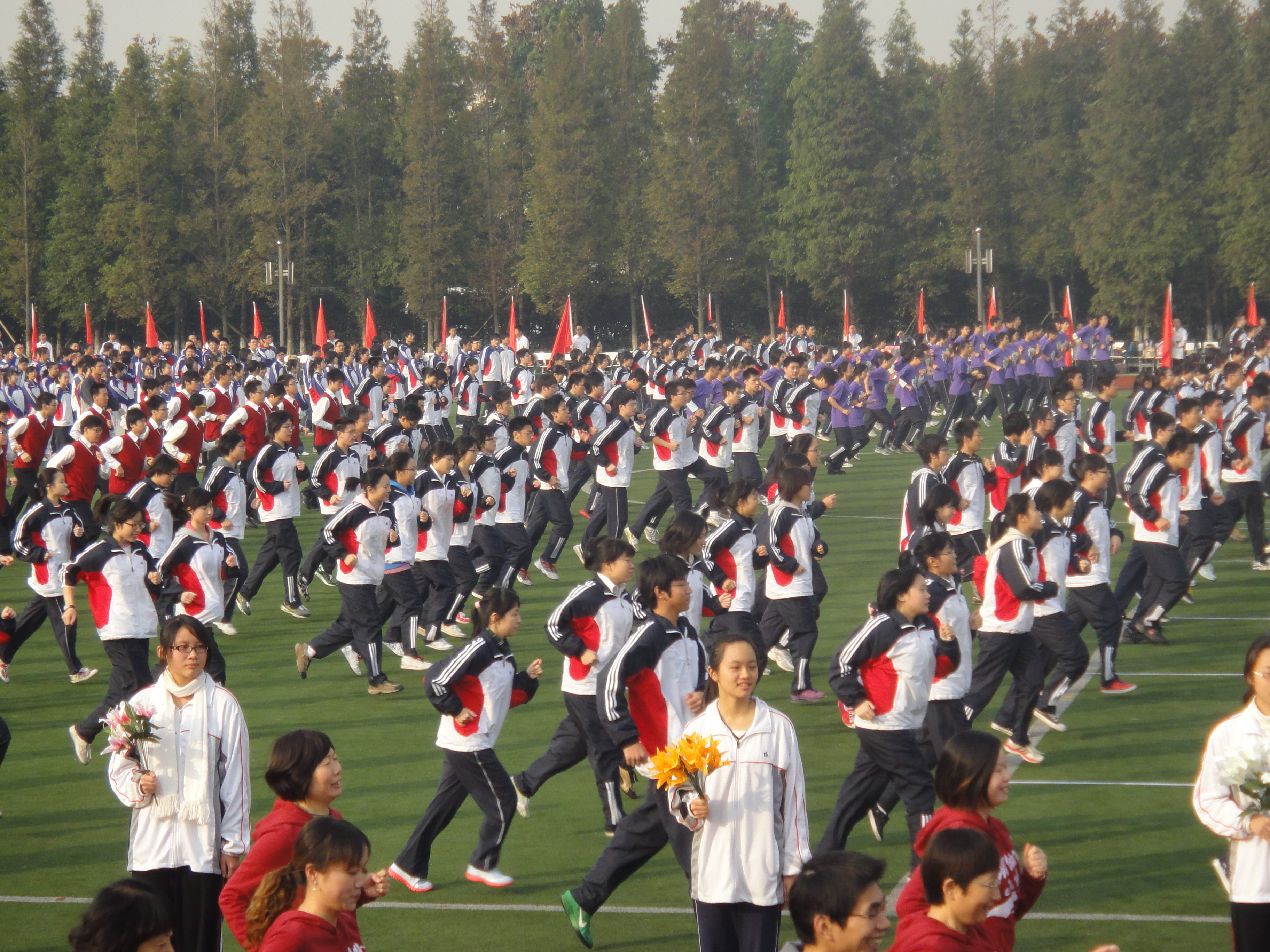 华师大二附中2011运动会会操